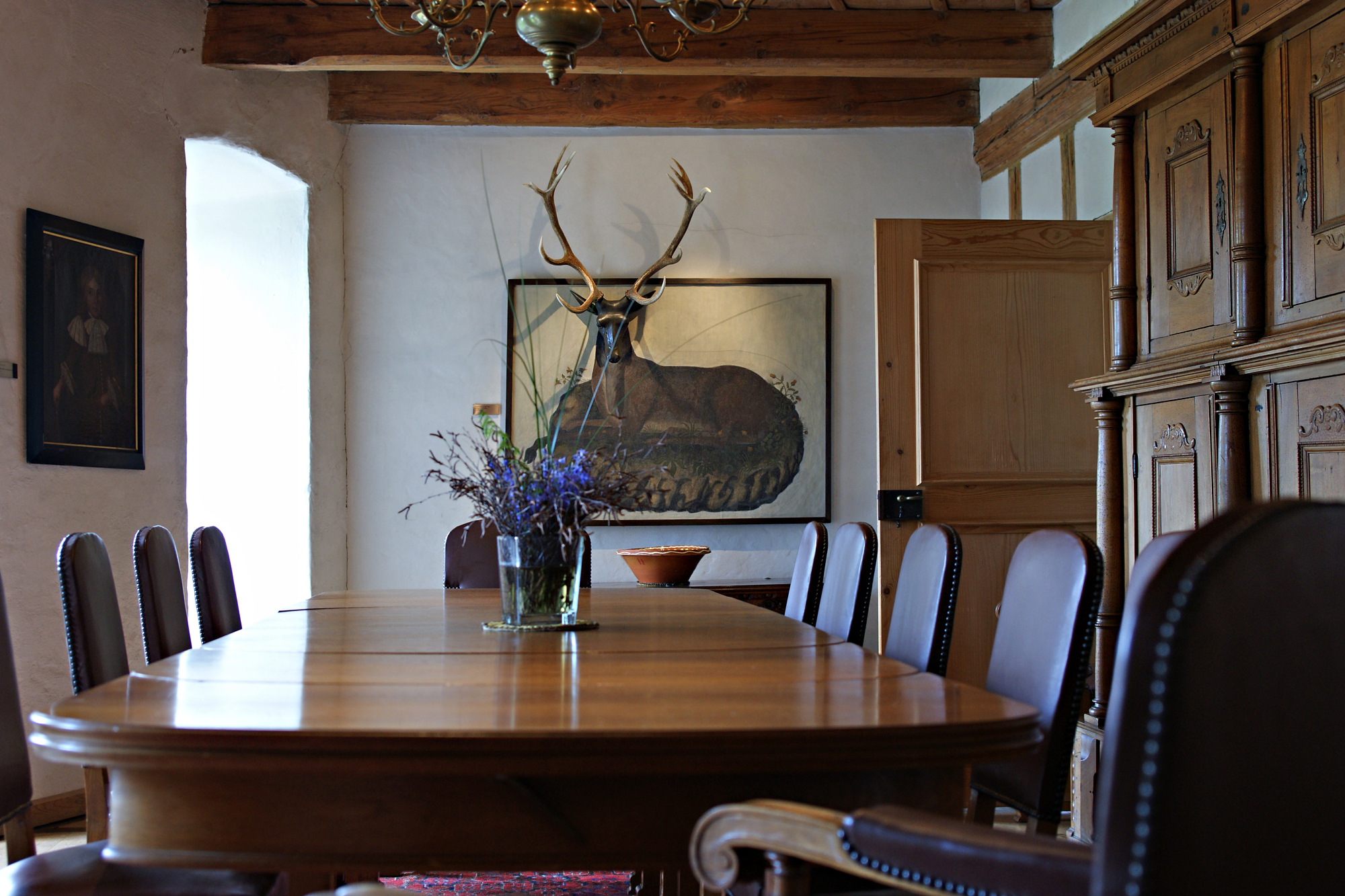 Sitzungszimmer des Fürsten im Schloss Landshut, Utzenstorf